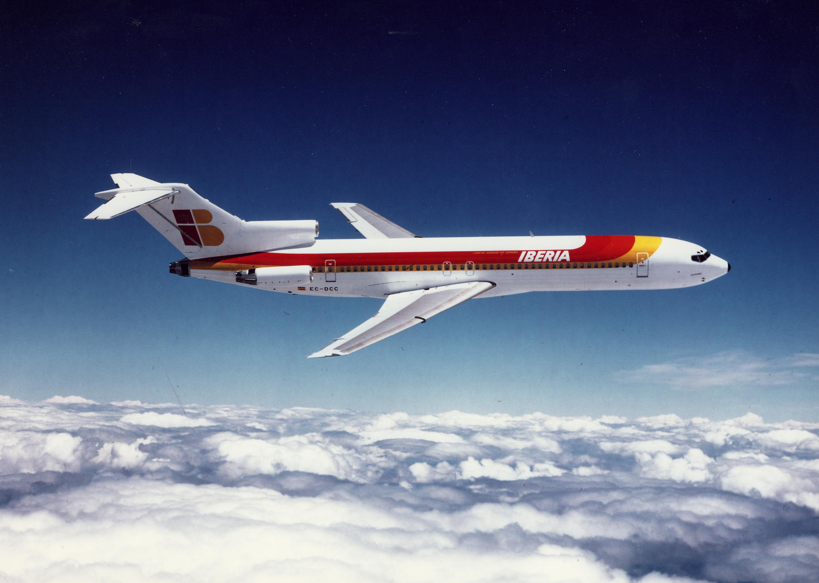 EC-DCC